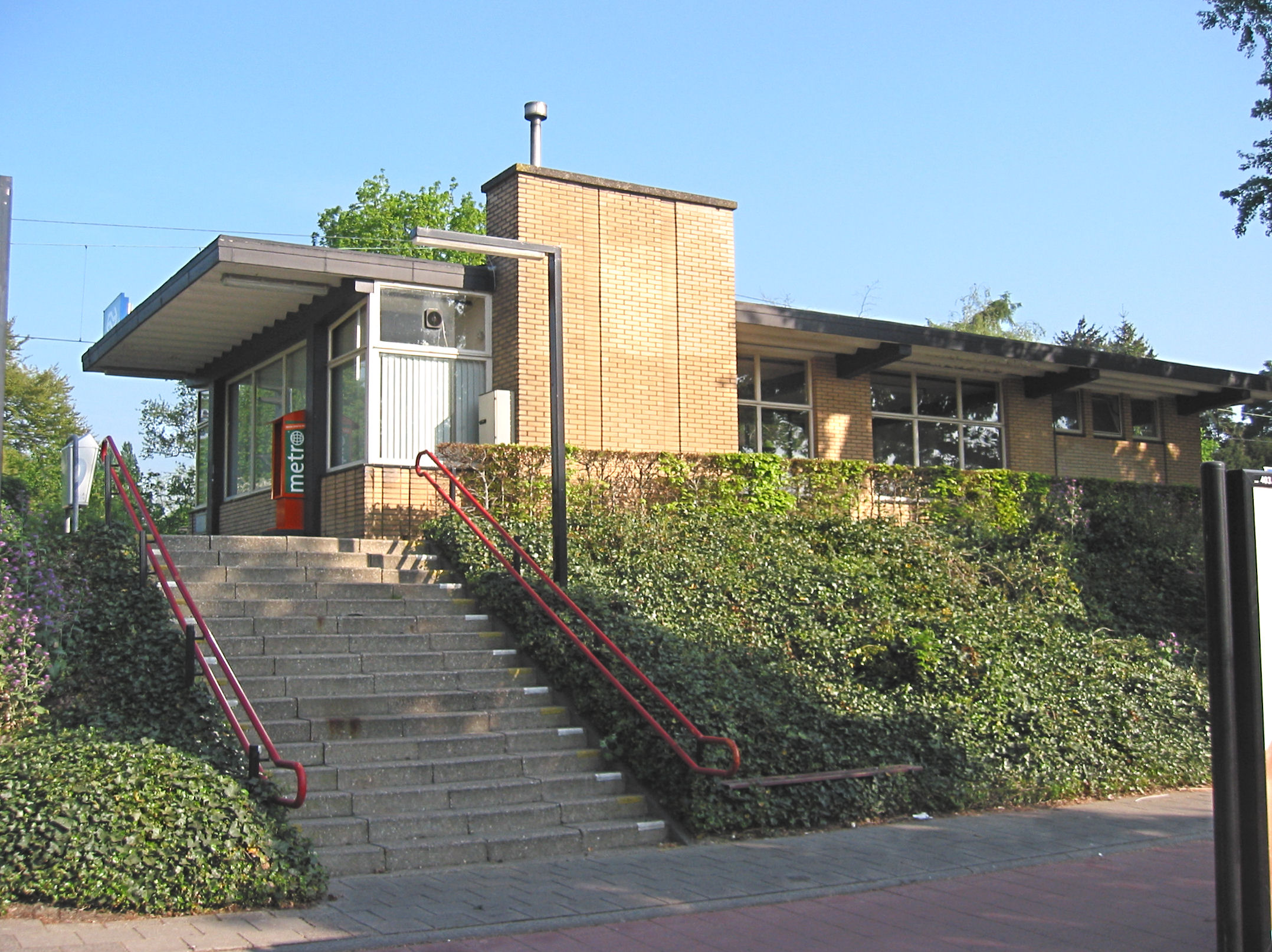 Station Soest-Zuid voorzijde